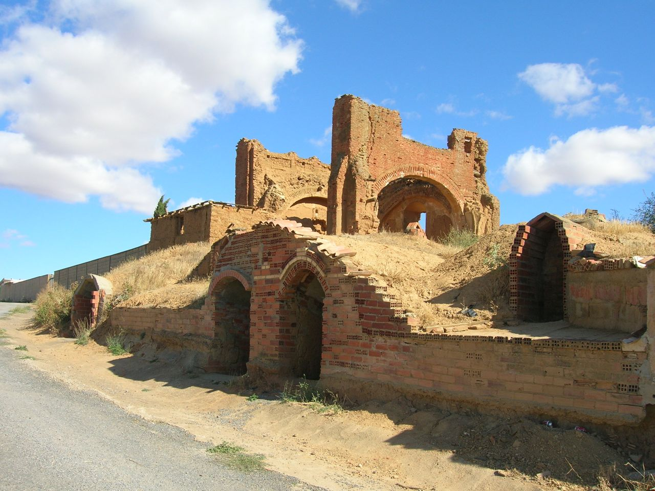 El 11 de Diciembre del año 2000 será recordado por las gentes del pueblo como un día triste por la caída de la Torre motivada por las fuertes lluvias.